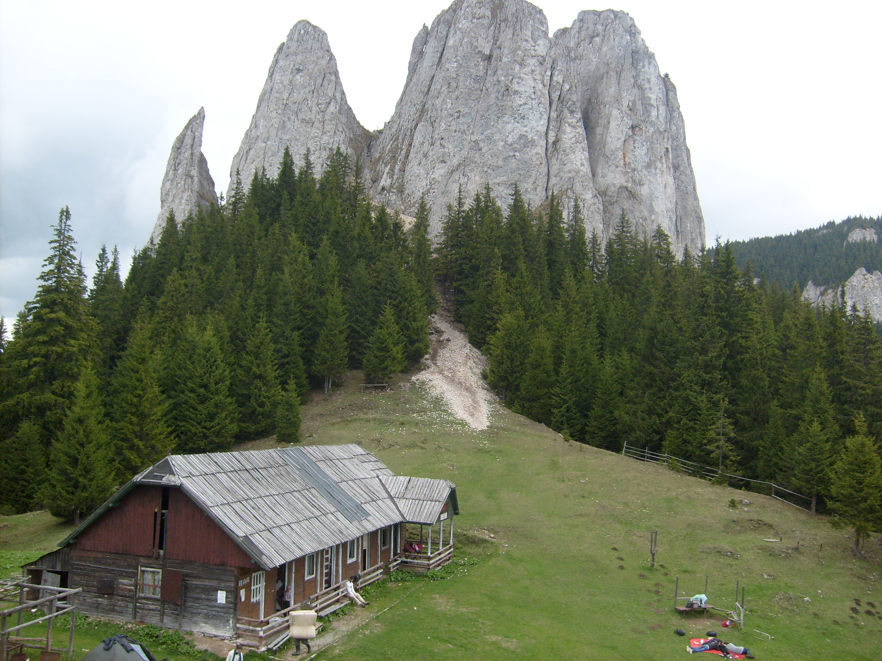 Egyes-kő, Hargita megye, Románia